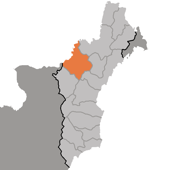 Map of Musan, Hamgyong-pukto, DPRK, 2006